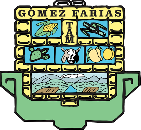 Escudo del Municipio de Gómez Farías, Tamaulipas, México